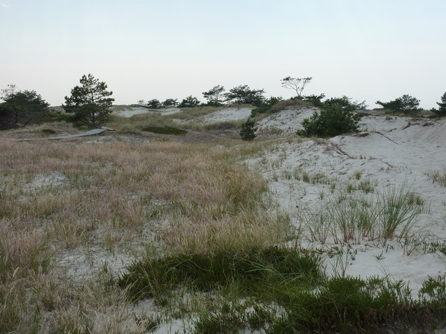 Darßer Ort, Dünen am Rundwanderweg (Mecklenburg-Vorpommern).